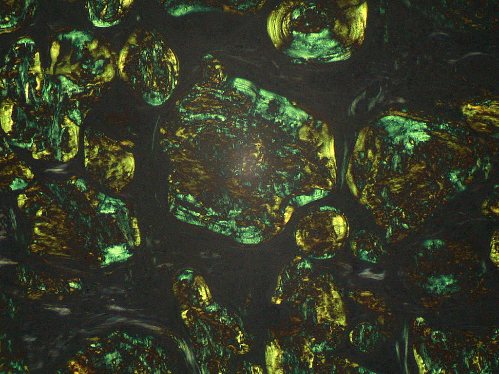 Amyloidosis, Node, apple green birefringence under polarizers.